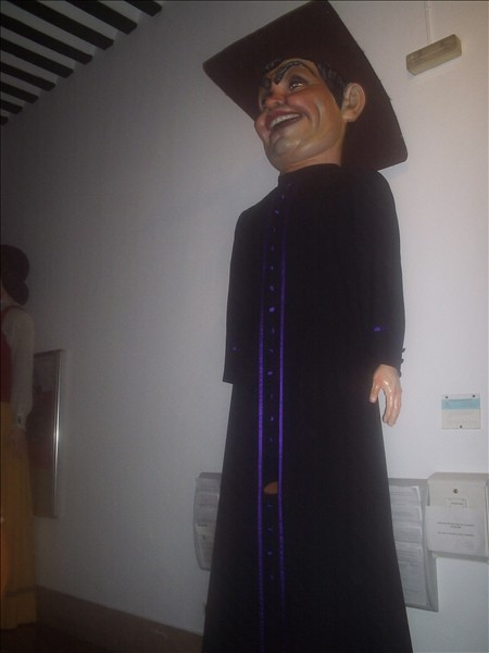 Gigantes de Alcalá de Henares